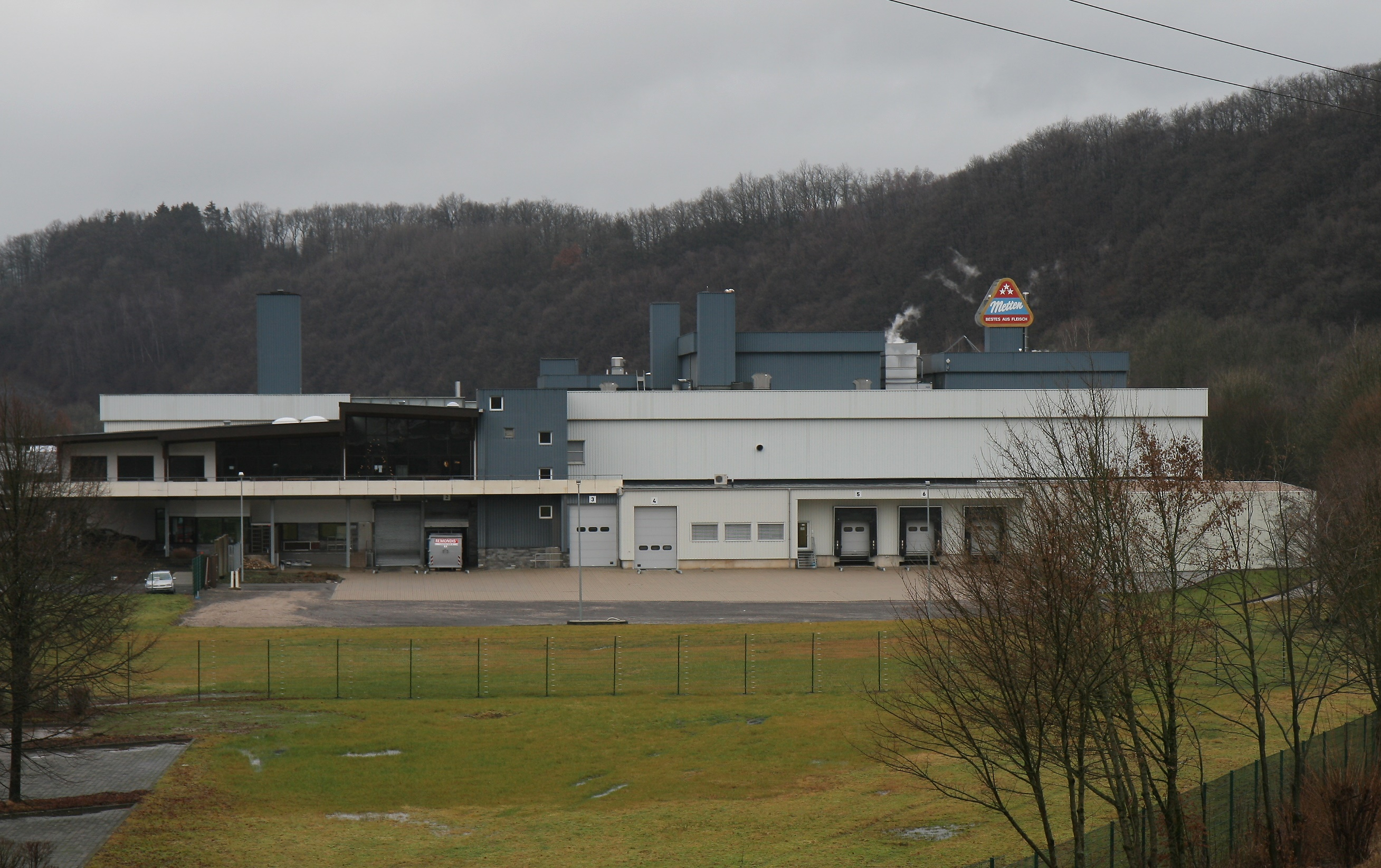 Metten Fleischwaren in Finnentrop.